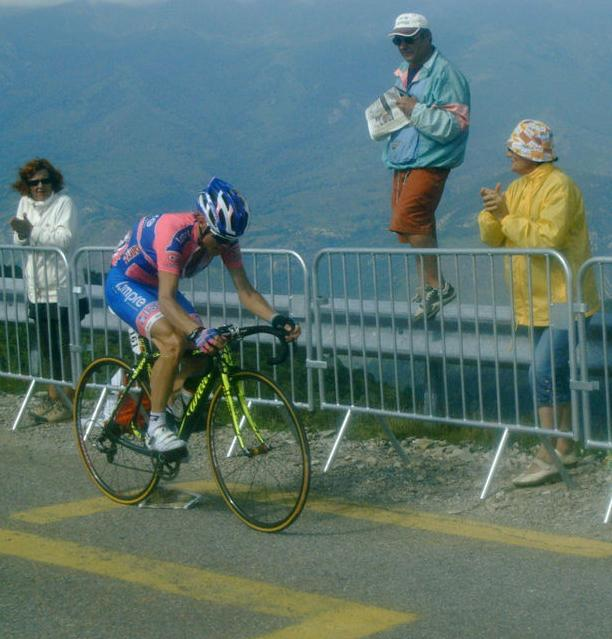 Le coureur cycliste Damiano Cunego lors de la quatorzième étape du Tour de France 2011. Je remercie [-OMAR-BRAVO-], auteur de la photo, de m'avoir permis de la mettre sur le site Wikimédia Commons.